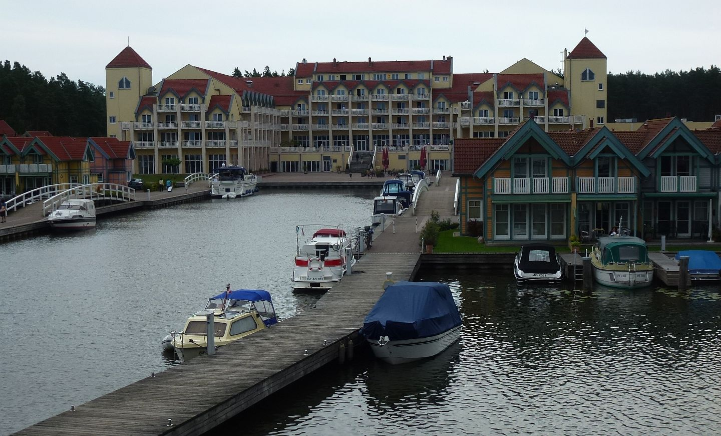 Hafendorf Rheinsberg. Das große Gebäude ist das Maritim Hafenhotel Rheinsberg (